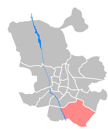 Locator maps of districts in Madrid: Maps - ES - Madrid - Villa de Vallecas.PNG